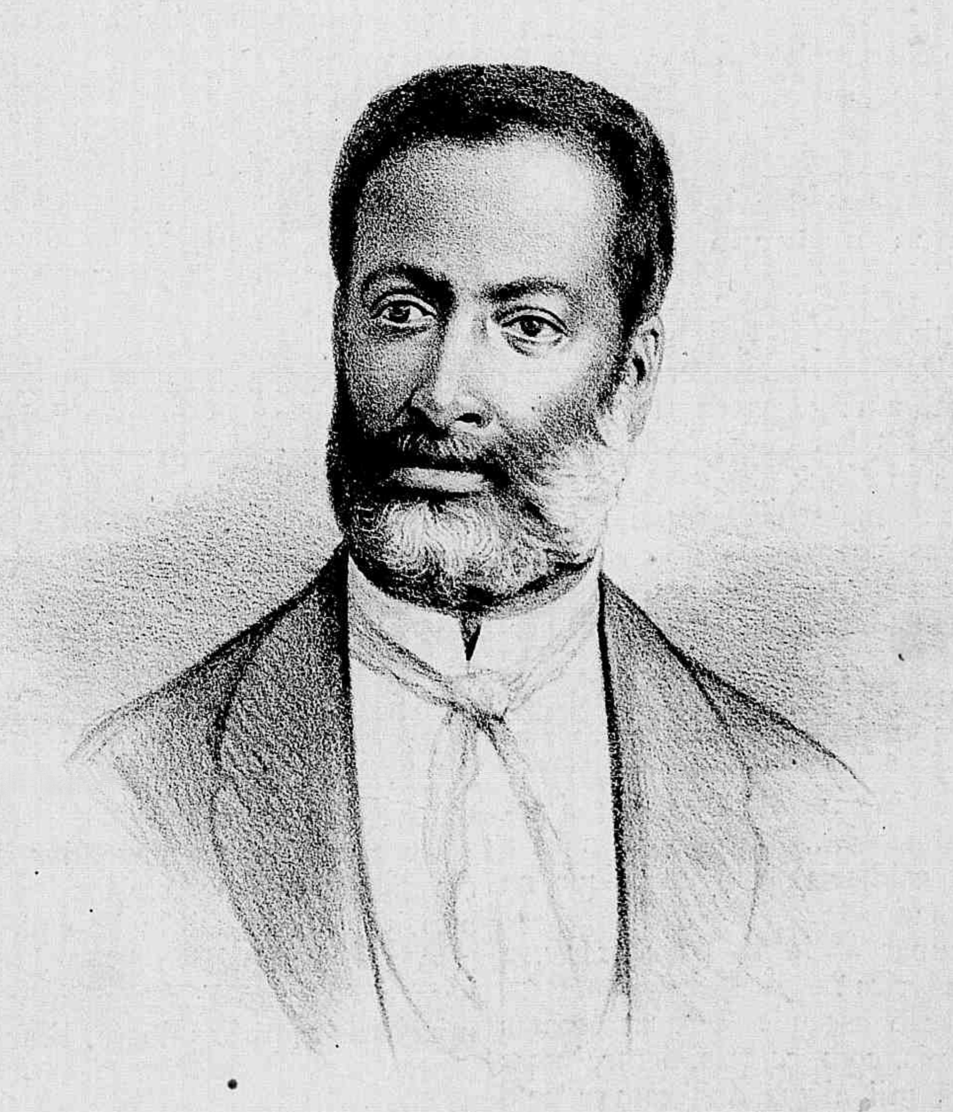 Desenho de Luiz Gama, publicado na edição 284 do jornal "O Mequetrefe" do Rio de Janeiro, em 1882, feito pelo escritor e cartunista Raul Pompeia.